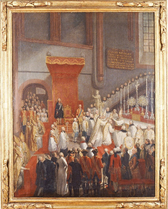 Das hochrechteckige Bild in zeitgenössischem Rahmen zeigt einen Blick in den Ostchor des Trierer Domes. Dargestellt ist die Konsekration des Johann Nepomuk August Freiherr von Ungelter zu Deissenhausen (1731-1804) zum Titularbischof von Pella und Weihbischof von Augsburg am 29. August 1779 durch den Trierer Erzbischof und Kurfürsten Clemens Wenzeslaus, der zugleich auch Bischof von Augsburg war. Der unbekannte Maler hat den Augenblick dargestellt, als der Erzbischof, vor dem Hochaltar des Trierer Domes sitzend, unter Assistenz der beiden kirchenrechtlich notwendigen bischöflichen Mitkonsekratoren dem vor ihm knienden Weihbischof die Mitra aufsetzt. Zahlreiche Kleriker stehen zu beiden Seiten und verrichten verschiedene Altardienste: einer reicht dem Erzbischof das Rituale, ein anderer hält seinen Bischofstab. Wieder andere, vor den Altarstufen stehend, halten die Bischofsstäbe der Mitkonsekratoren sowie das Vortragekreuz.